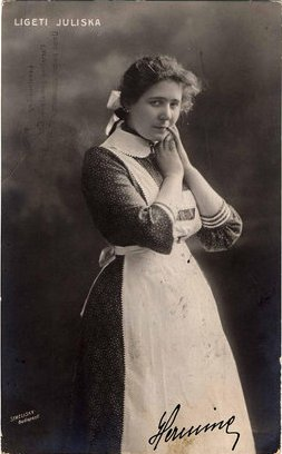 Gárdonyi Géza: Annuska. Nemzeti Színház. Bemutató: 1903/01/09. Annuska: Ligeti Juliska.